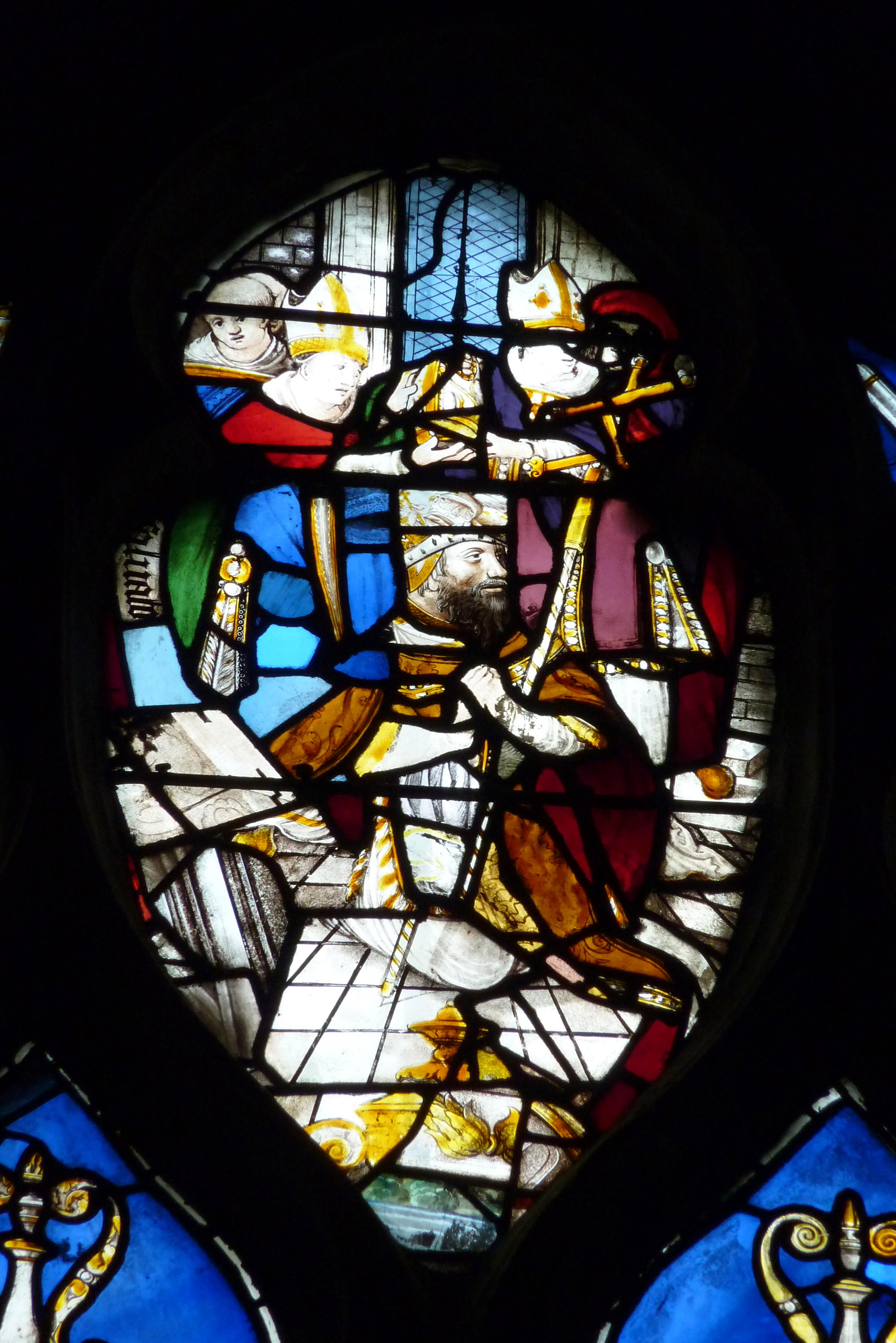 Katholische Pfarrkirche Saint-Aspais in Melun im Département Seine-et-Marne in der Region Île-de-France (Frankreich), Bleiglasfenster aus dem 16. Jahrhundert, Darstellung: Szenen aus dem Leben des hl. Lupus von Sens (Saint-Loup)